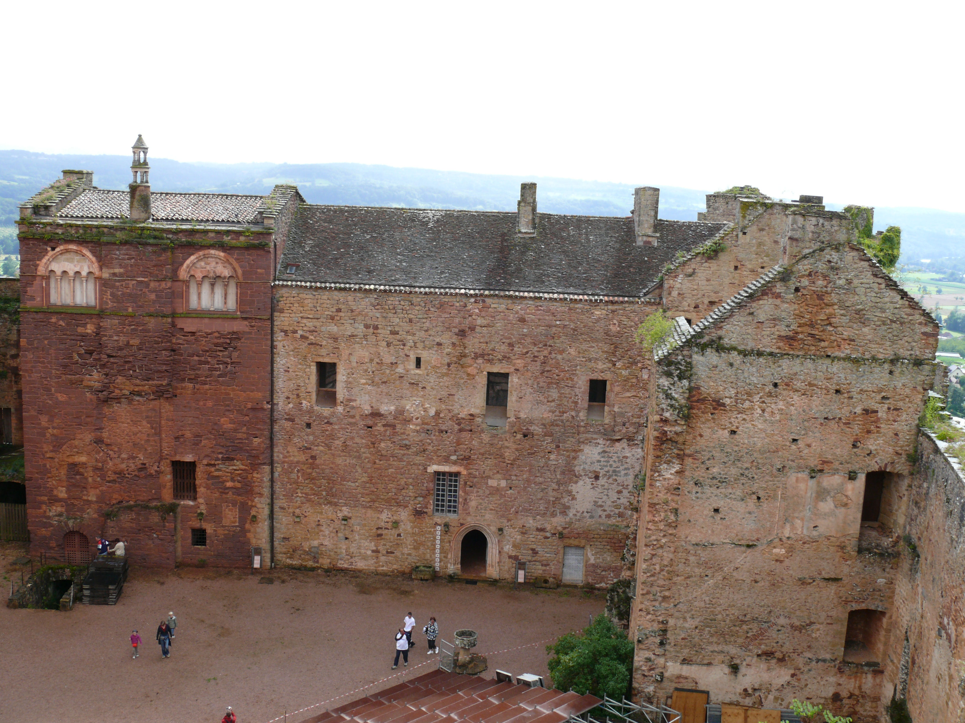 Château de Castelnau-Bretenoux - Tour de l'auditoire et ce qu'il reste du logis du 14ème siècle